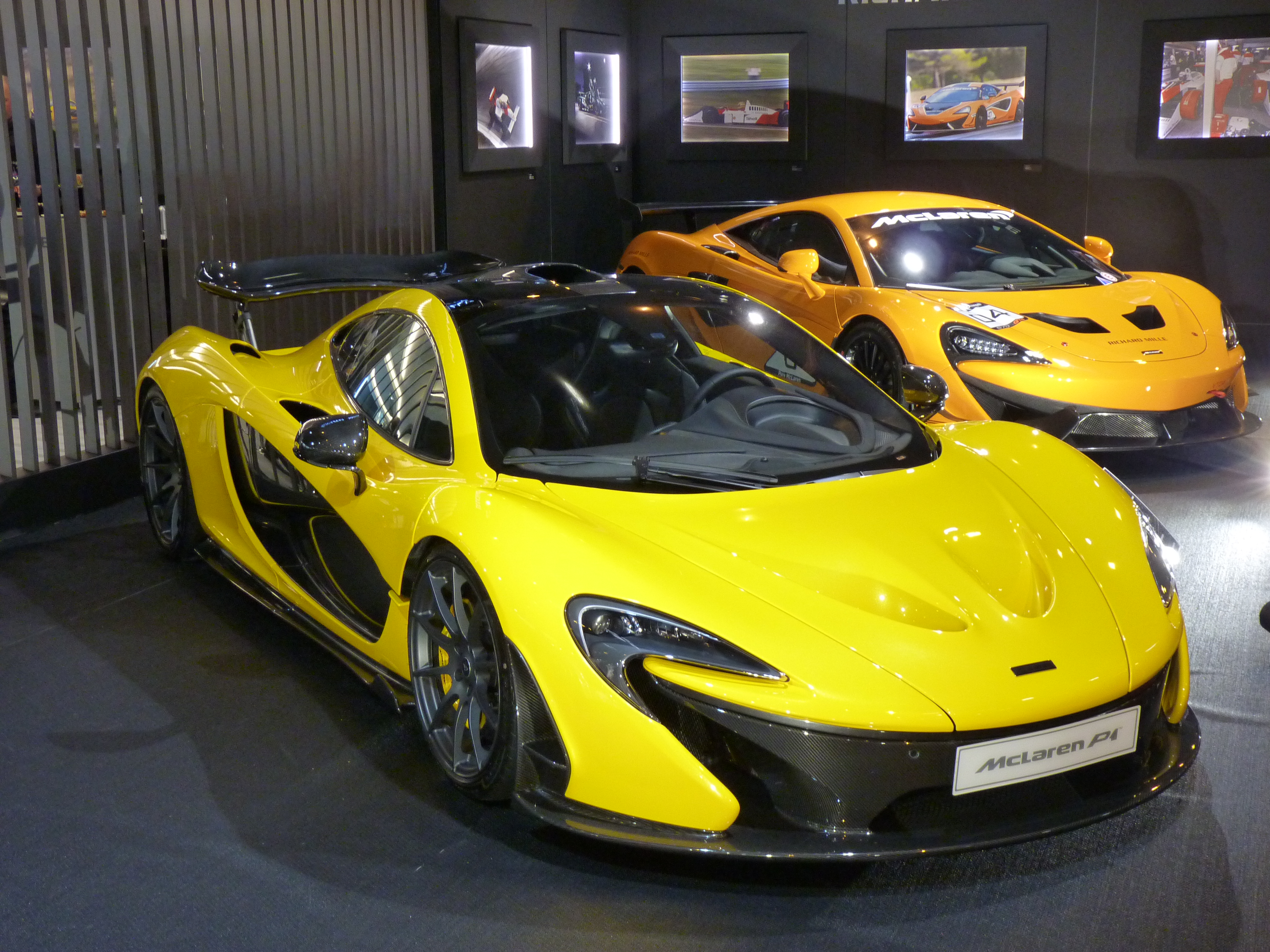 Exposition McLaren Rétromobile 2018